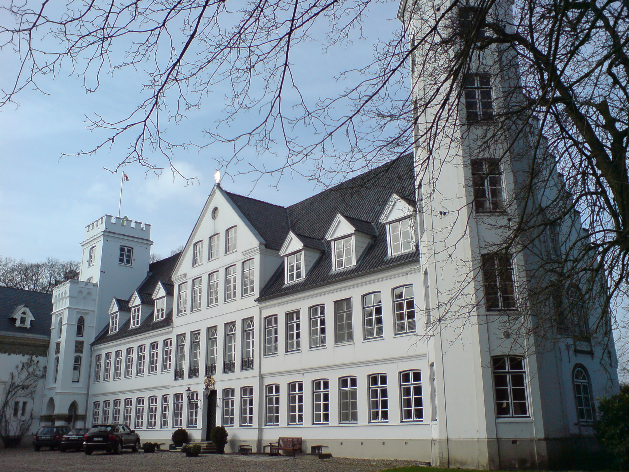 Description=Schloss Breitenburg, Hofansicht Source=myself Date=03.2008 Author=PodracerHH